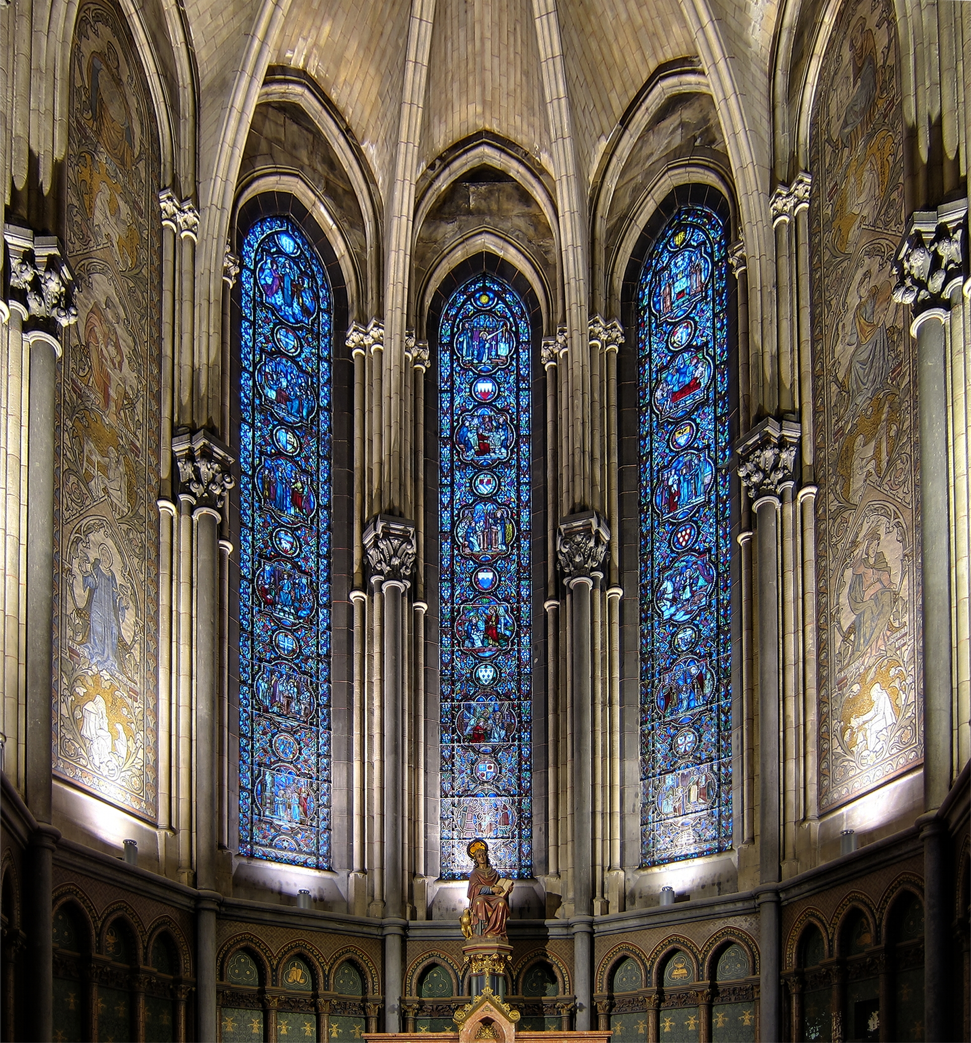 La chapelle Saint-Jean dans la cathédrale Notre-Dame-de-la-Treille de Lille (Nord).